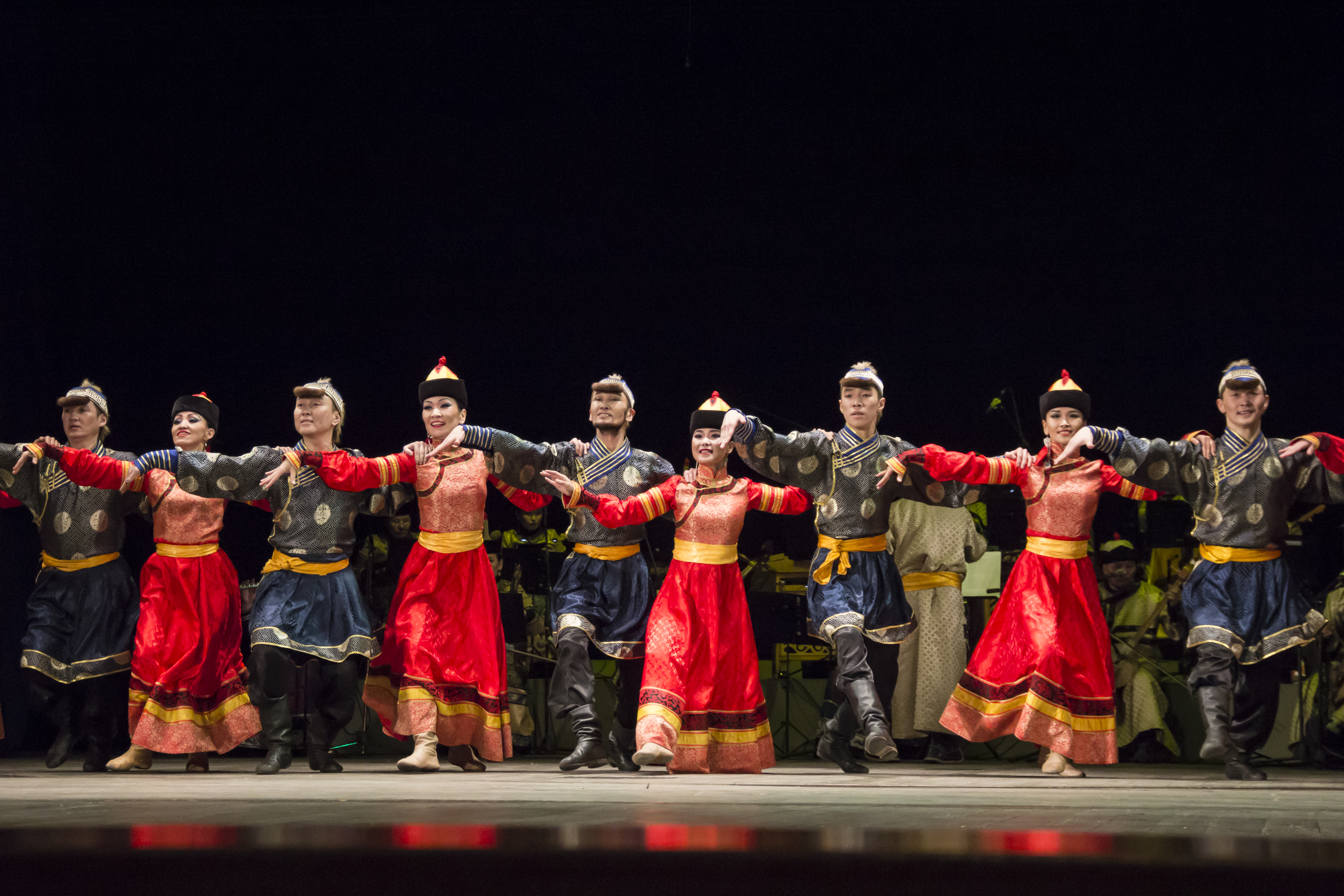 Государственный ансамбль Республики Тыва "Саяны"